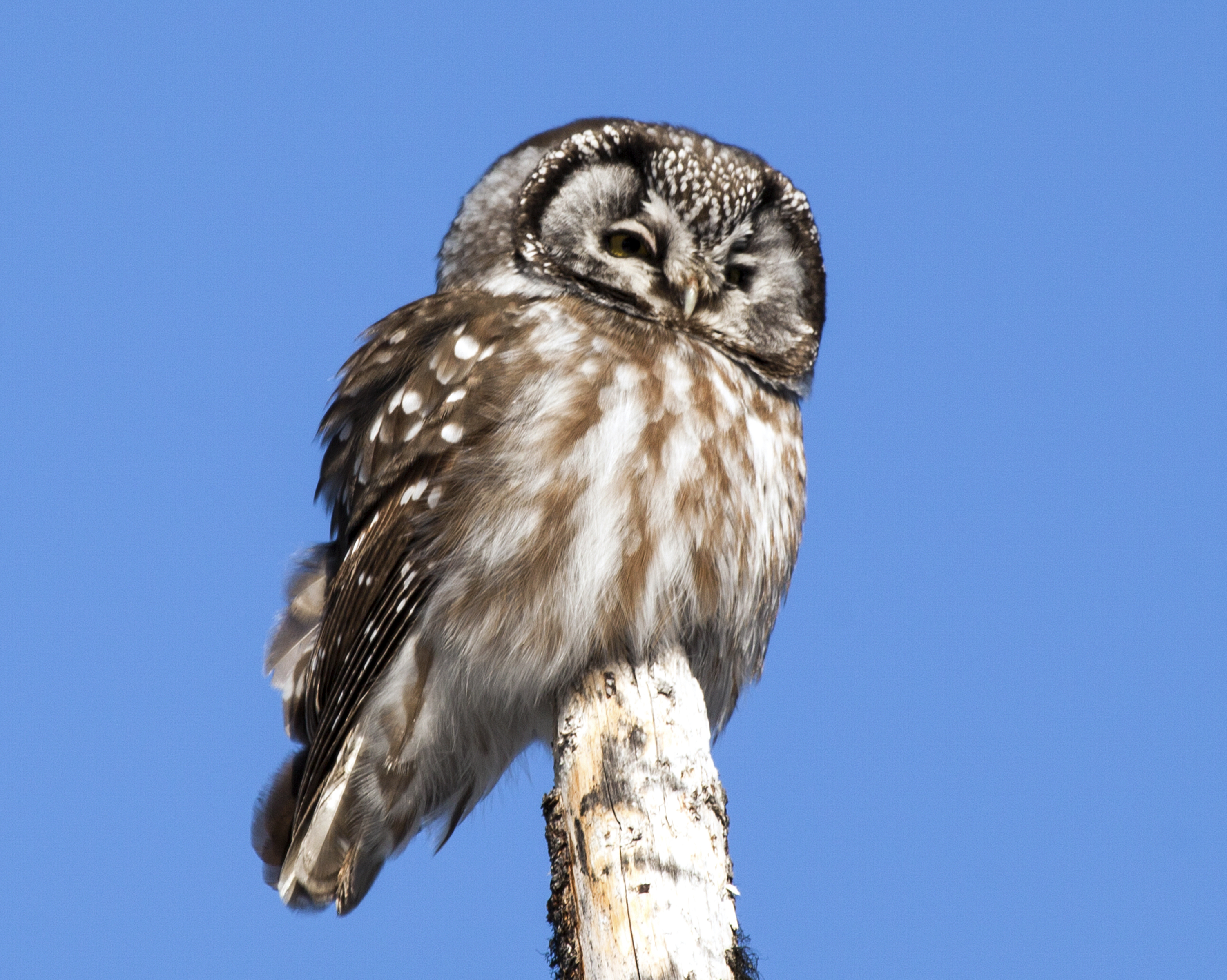 Taken in Denali National Park. (NPS Photo/Daniel A. Leifheit)